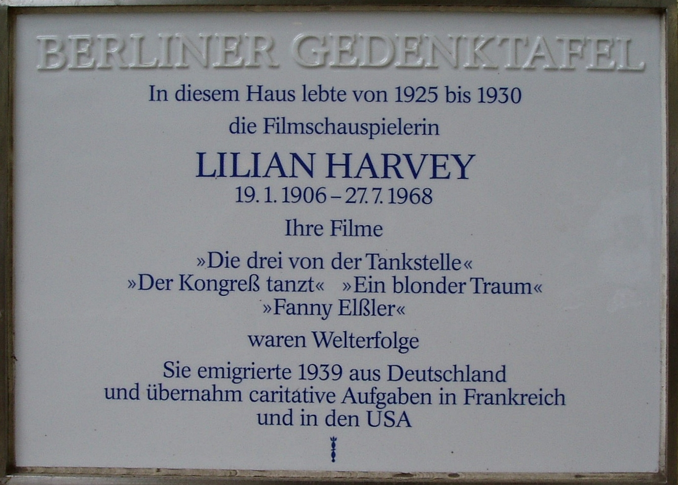 Berliner Gedenktafel für Lilian Harvey, 10707 Berlin, Düsseldorfer Straße 47